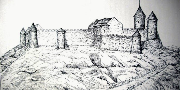 Високий замок у Львові кінця ХVІІ ст.